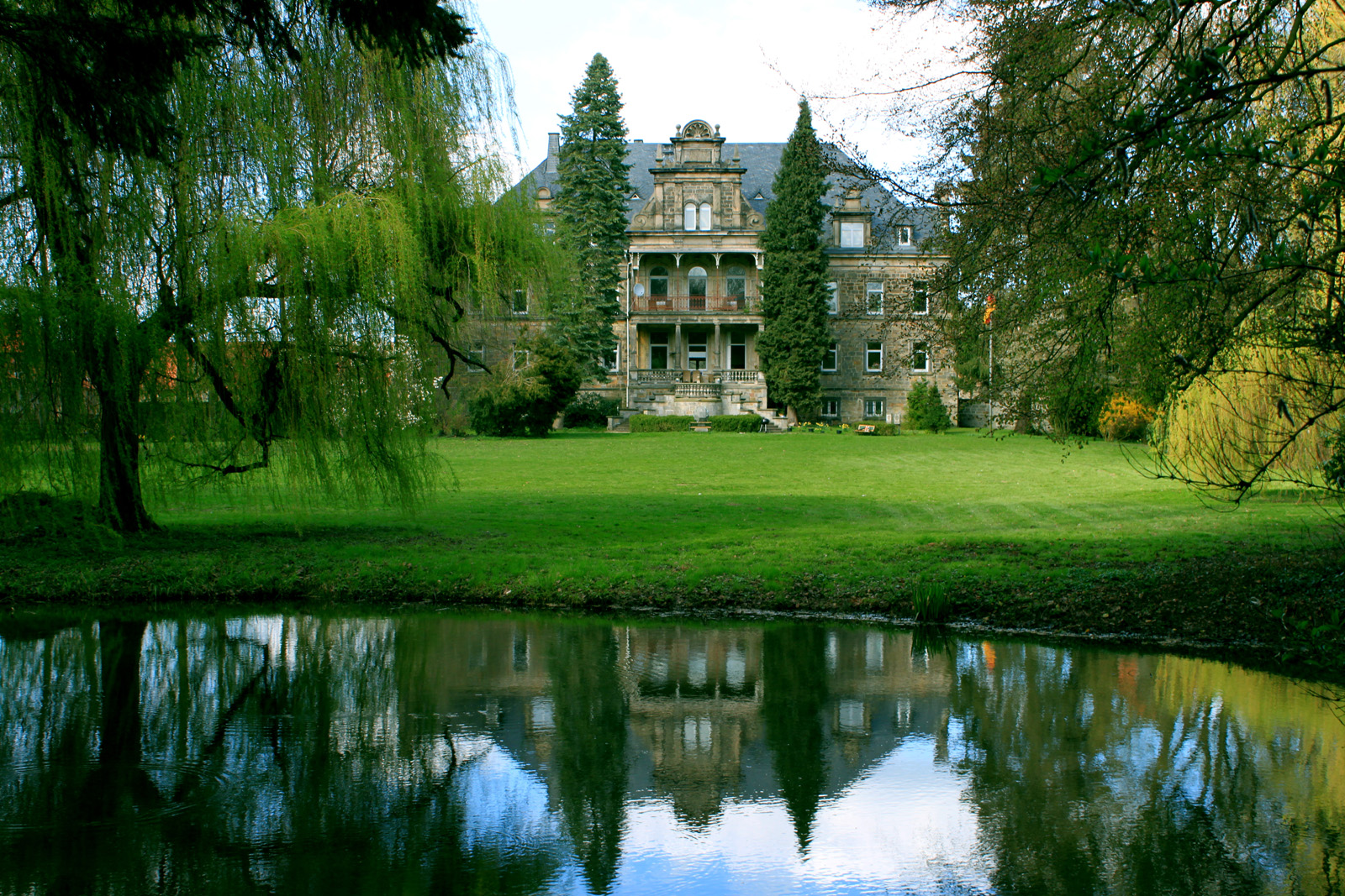 Rittergut Voldagsen - Herrenhaus und Herrenwiese mit einem Teil der Aue